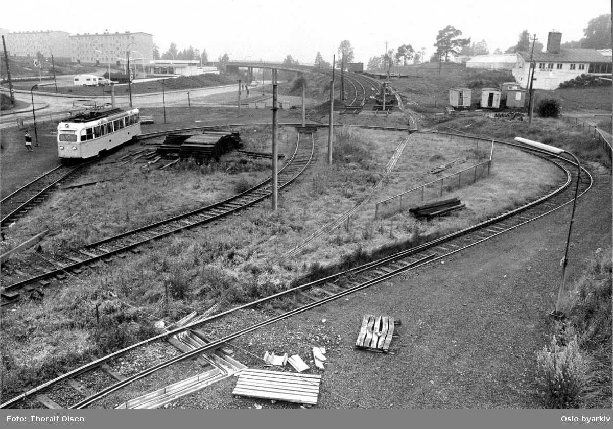 Trikkesløyfa på Bøler. T-banen under bygging videre til Skullerud.